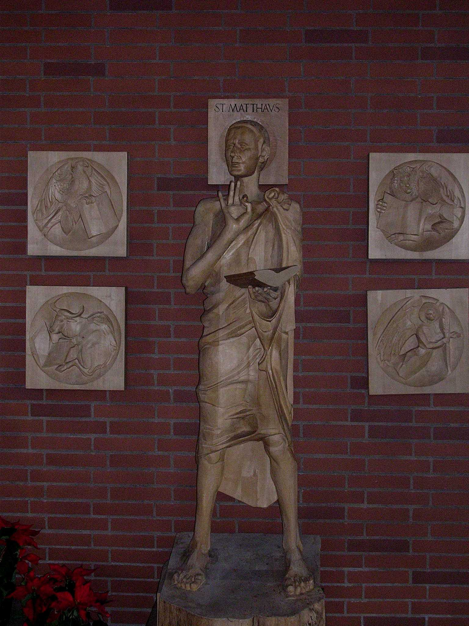 St. Matthäus (Aschaffenburg) - Gailbach Kirchenpatron Lindenholz 1982 von Rudolf Schwarzer, Bischofsheim